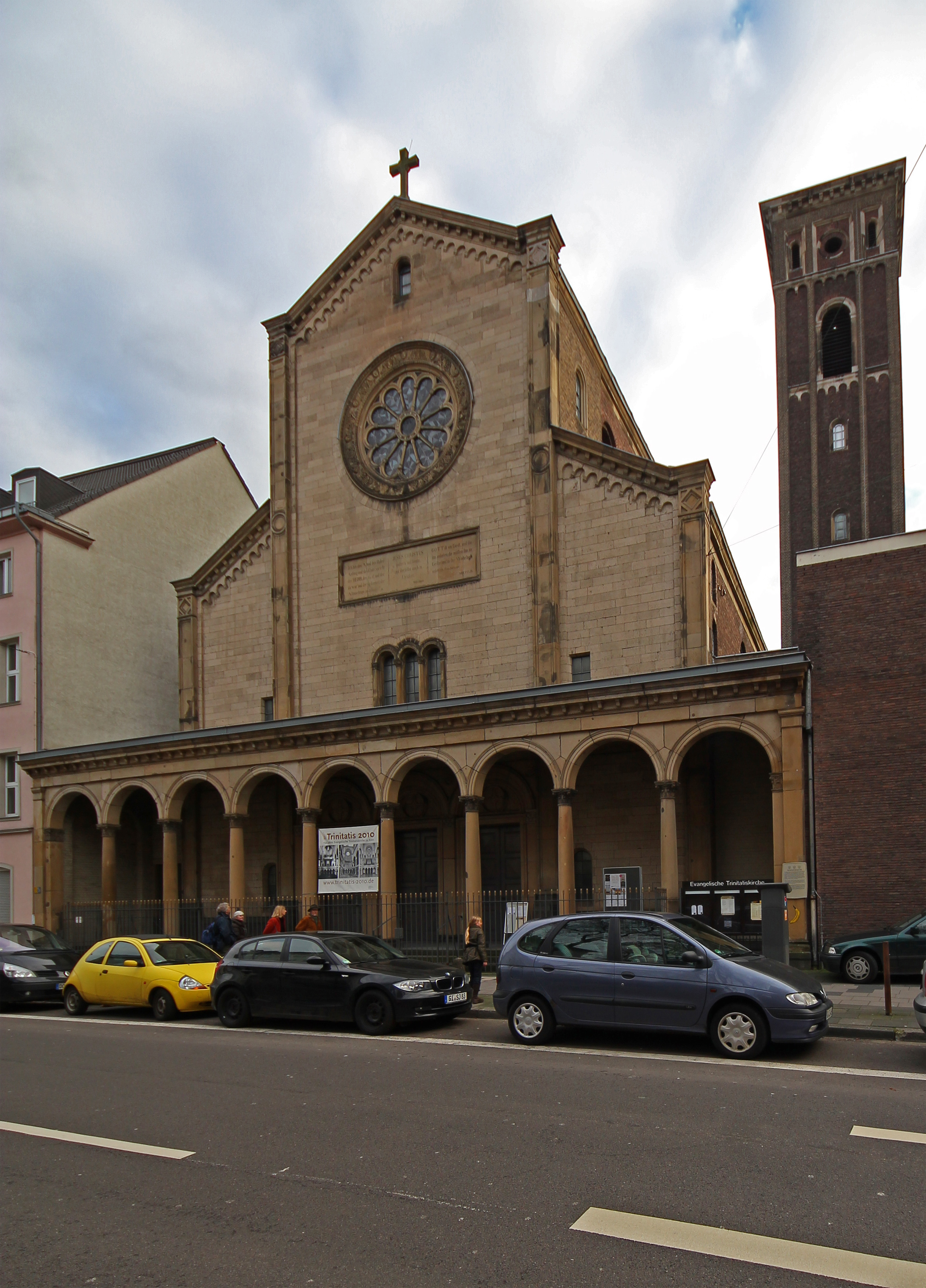 Die Trinitatiskirche in der Kölner Südstadt